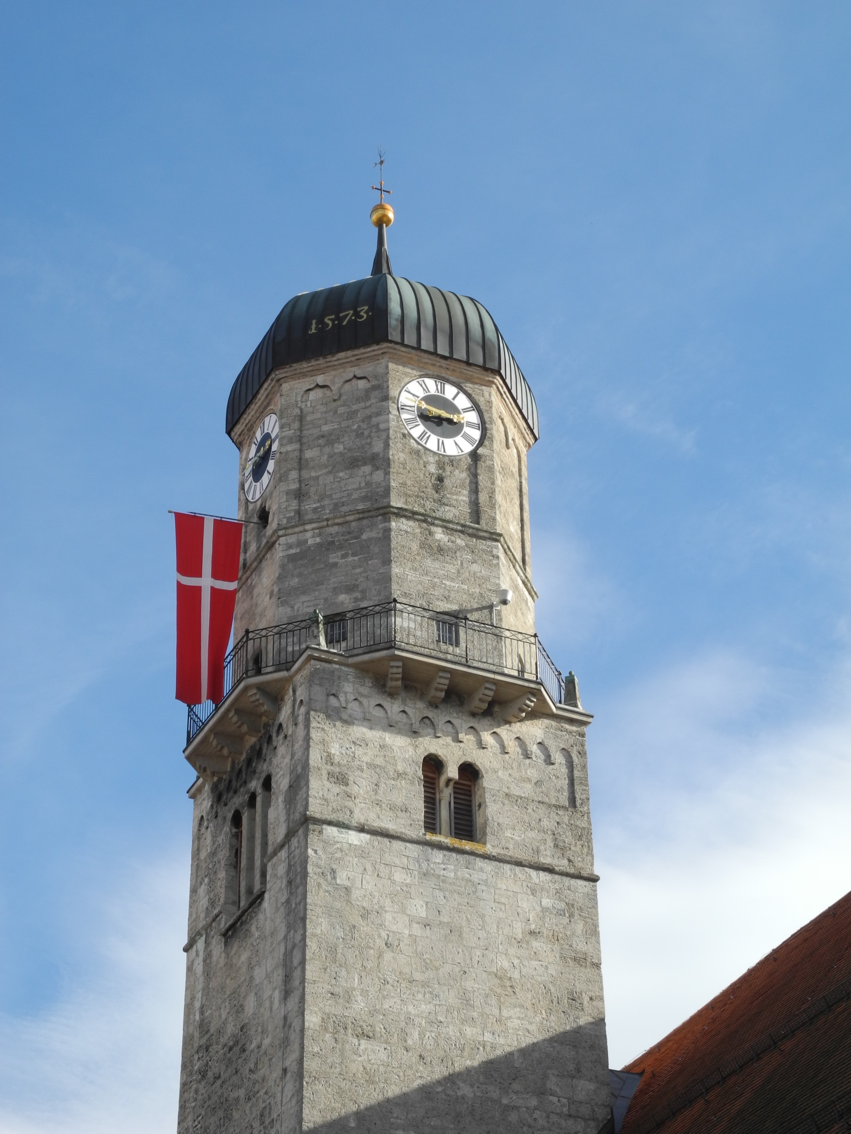 Weilheim - Kirchturm mit Fahne